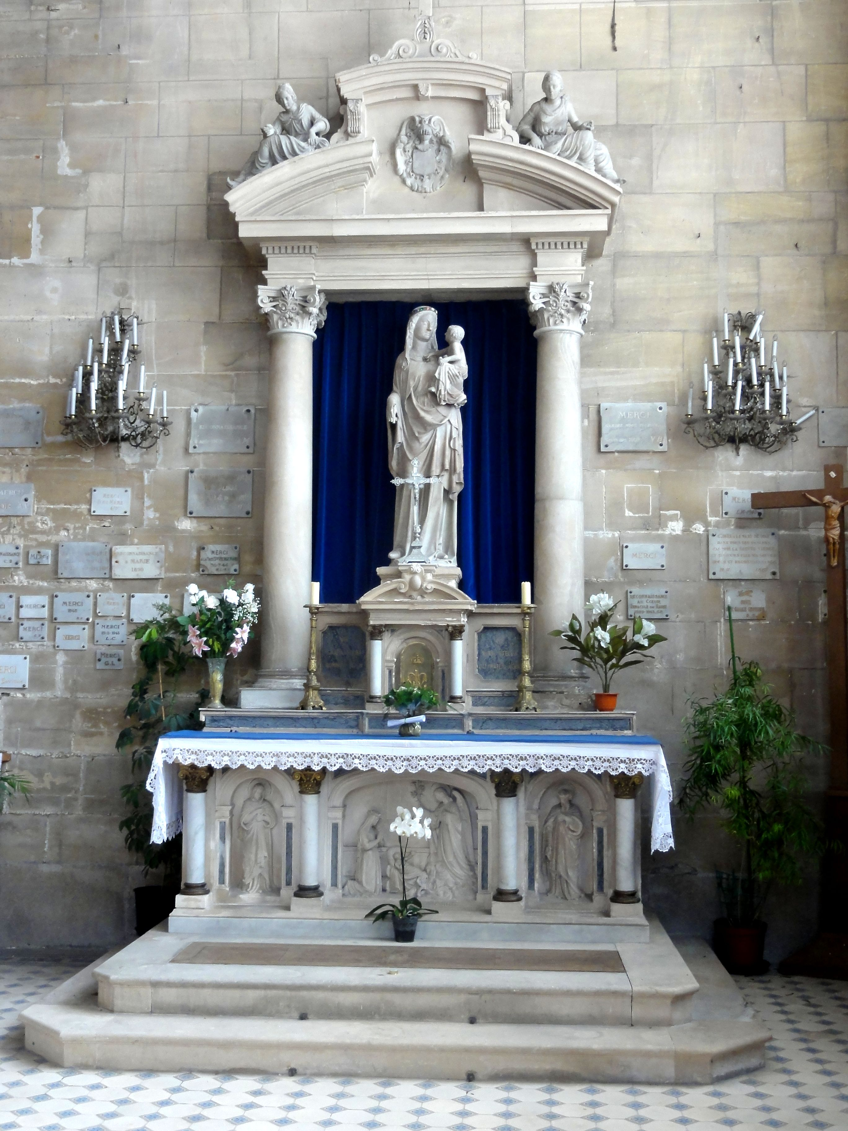 Autel de la Vierge.